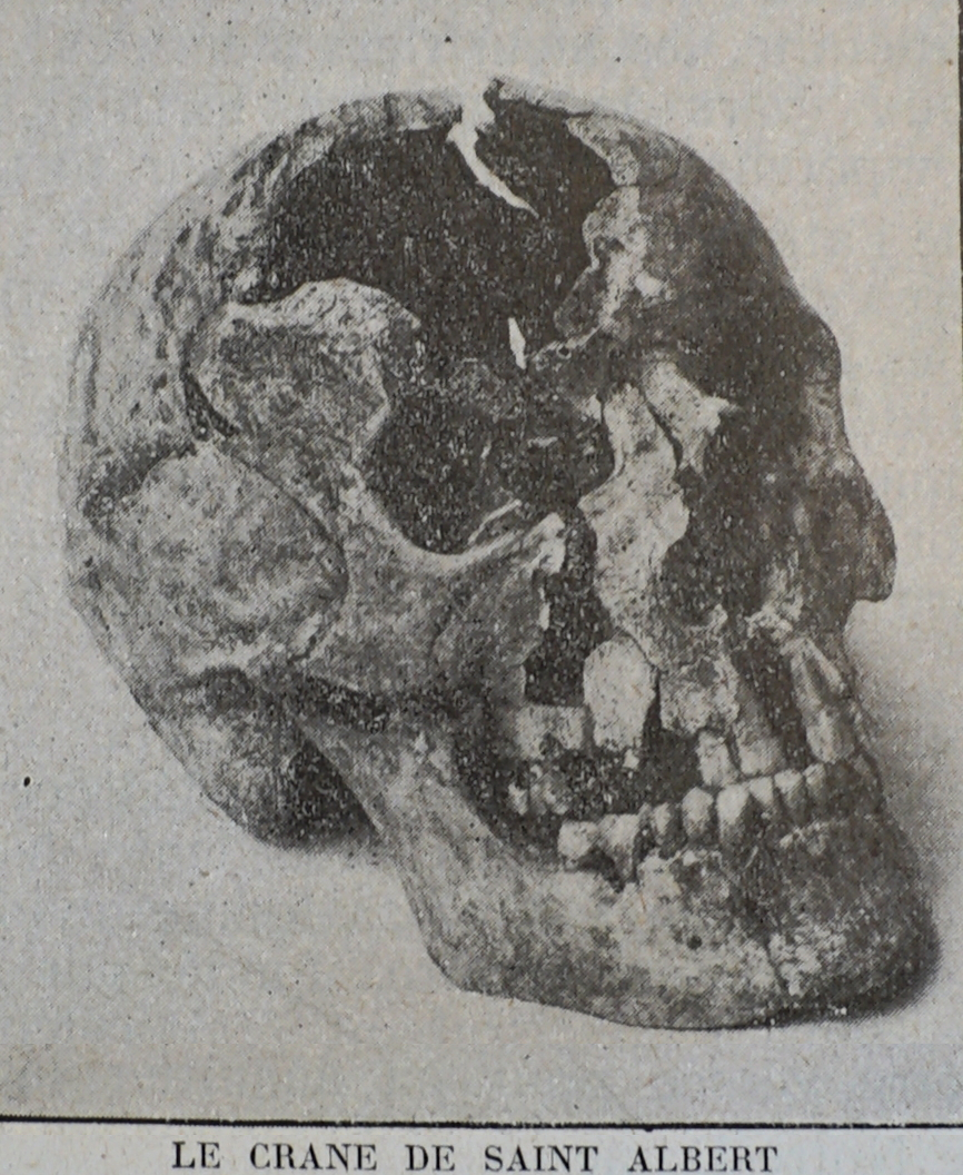 photographie du crane d'Albert trouvé en 1919 faite par le Ministère de la Culture.